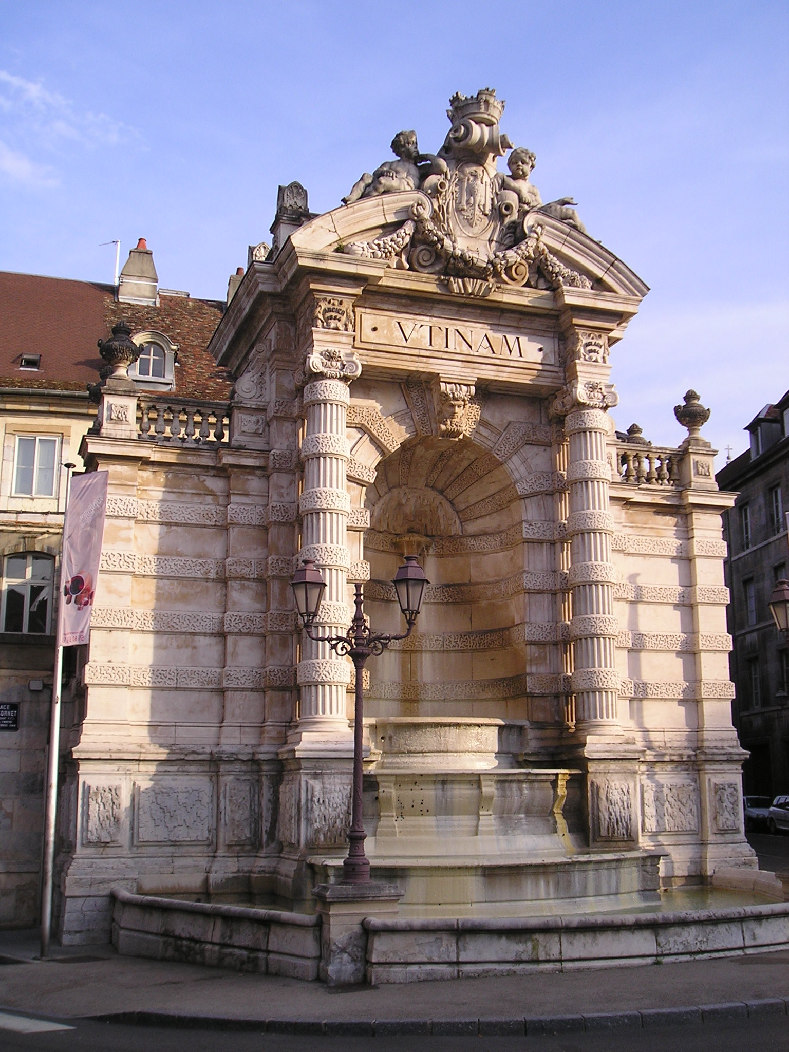 Fontaine de la Place Jean Cornet à Besançon, sur laquelle est gravée la devise de la ville "Utinam"